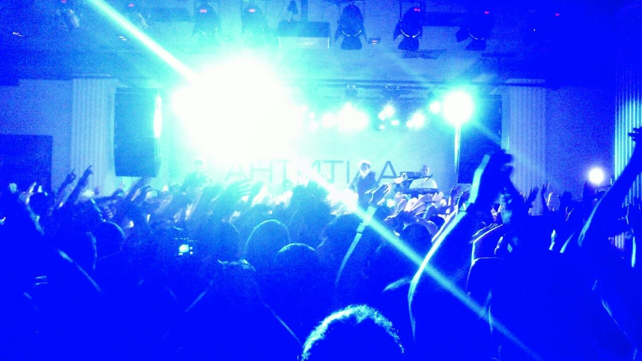 Антитела в Киеве